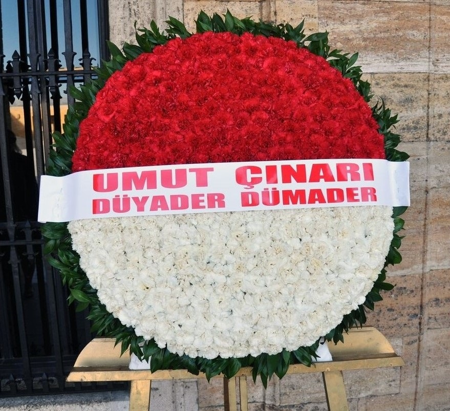 Anıtkabir'deki Dünya Yaşlılık Derneği ve Umut Çınarı çelengi.